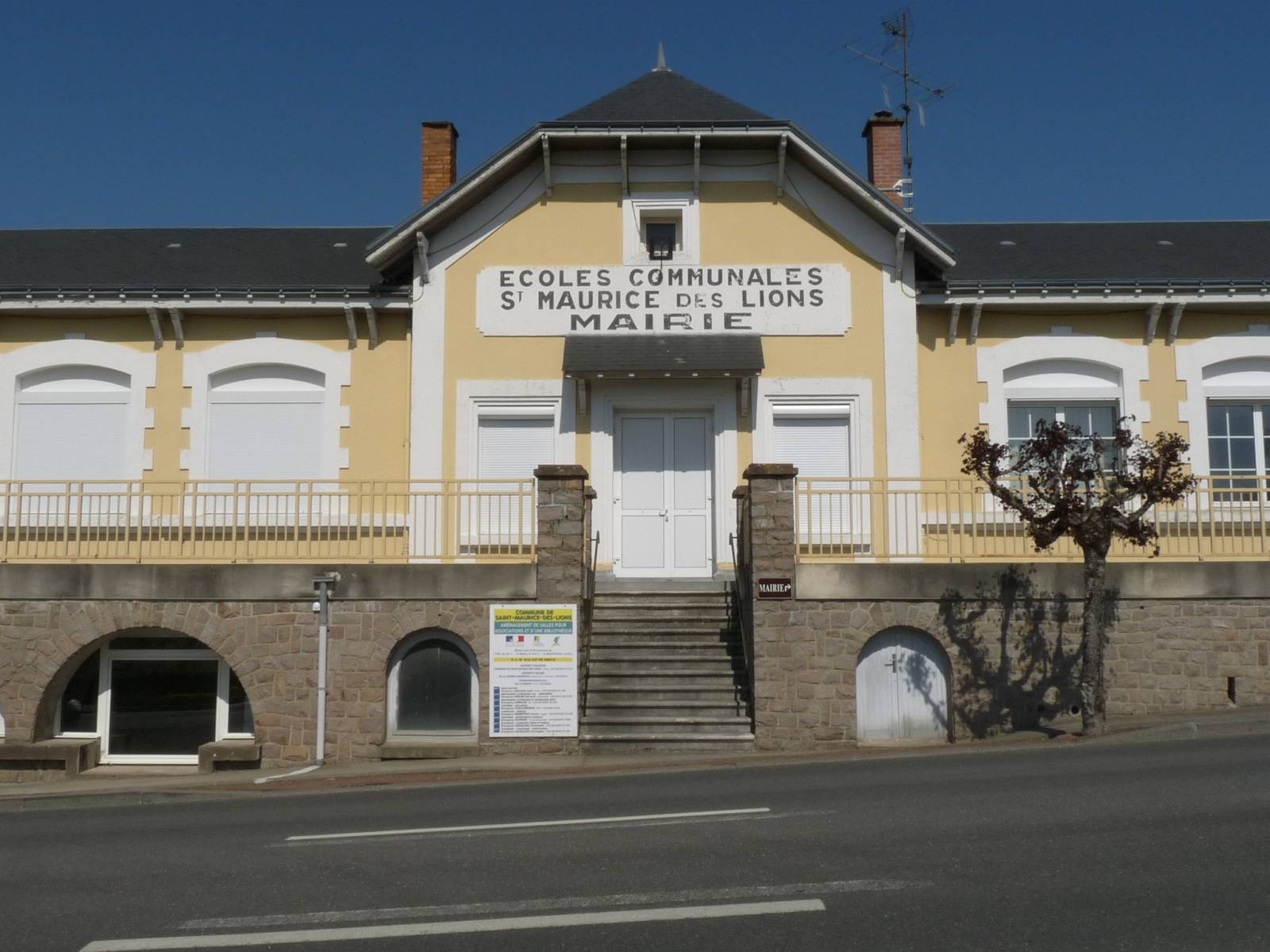 Mairie de Saint-Maurice-des-Lions, Charente, France